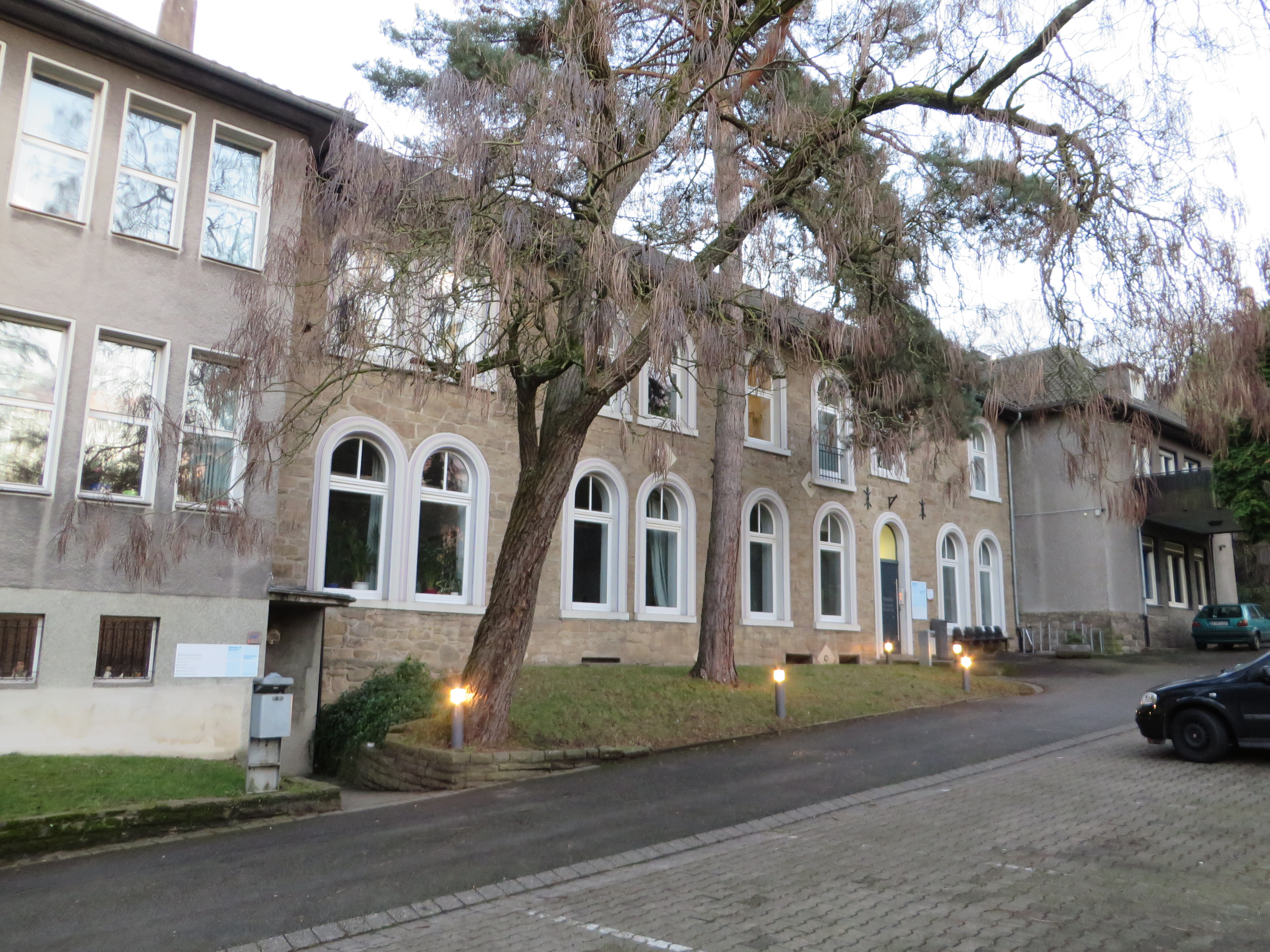 Diakonisches Zentrum, ehemaliges Maschinenhaus des Seilschachtes der Zeche Franziska Tiefbau in Witten